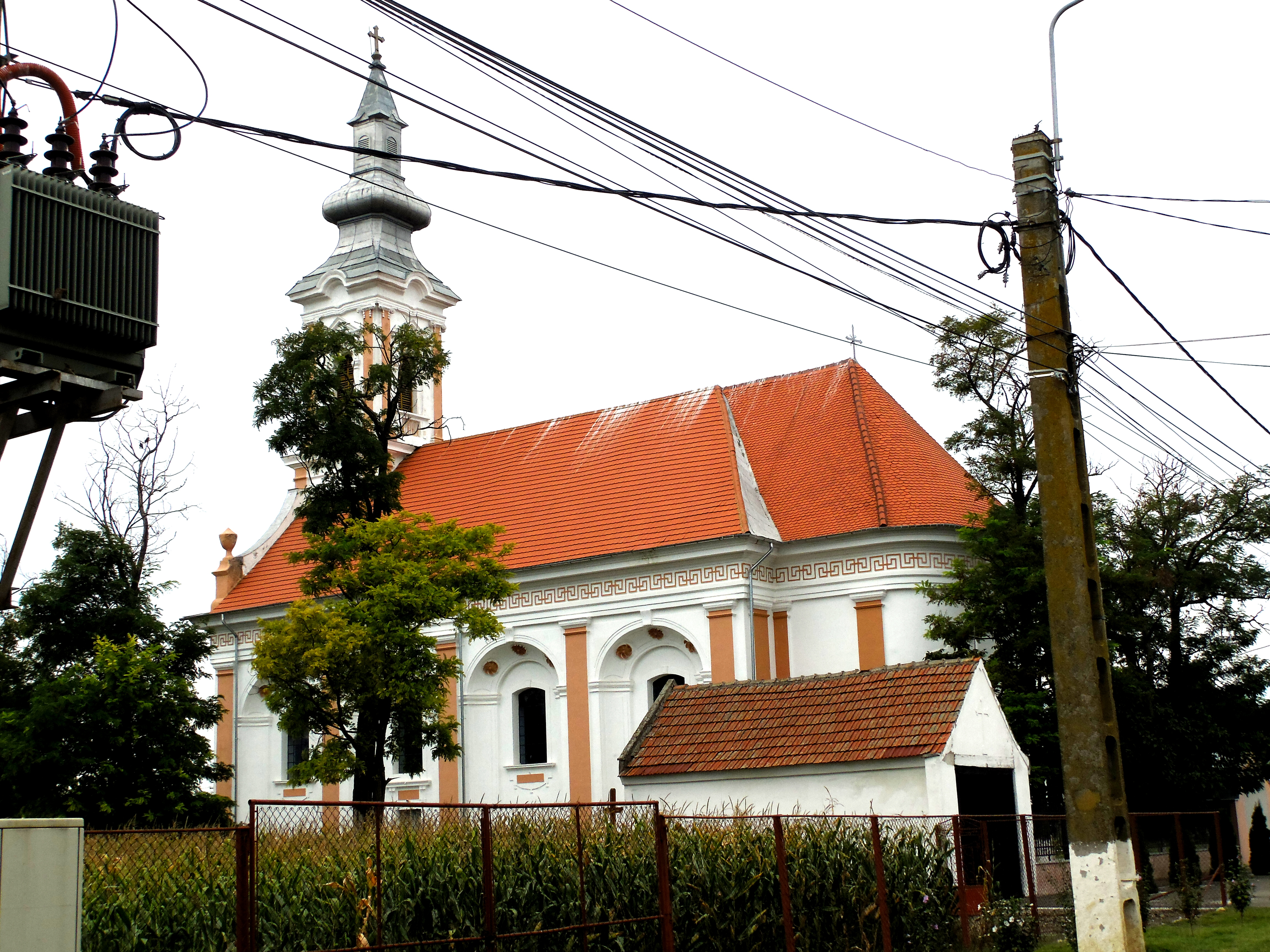 Biserica „Mutarea moaștelor Sf. Nicolae”